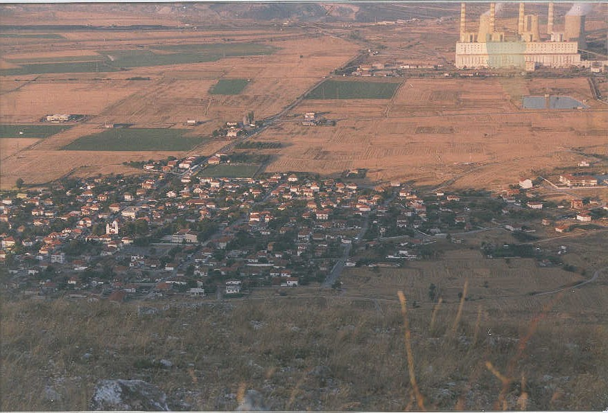 Η ΠΟΝΤΟΚΩΜΗ ΑΠΟ ΨΗΛΑ